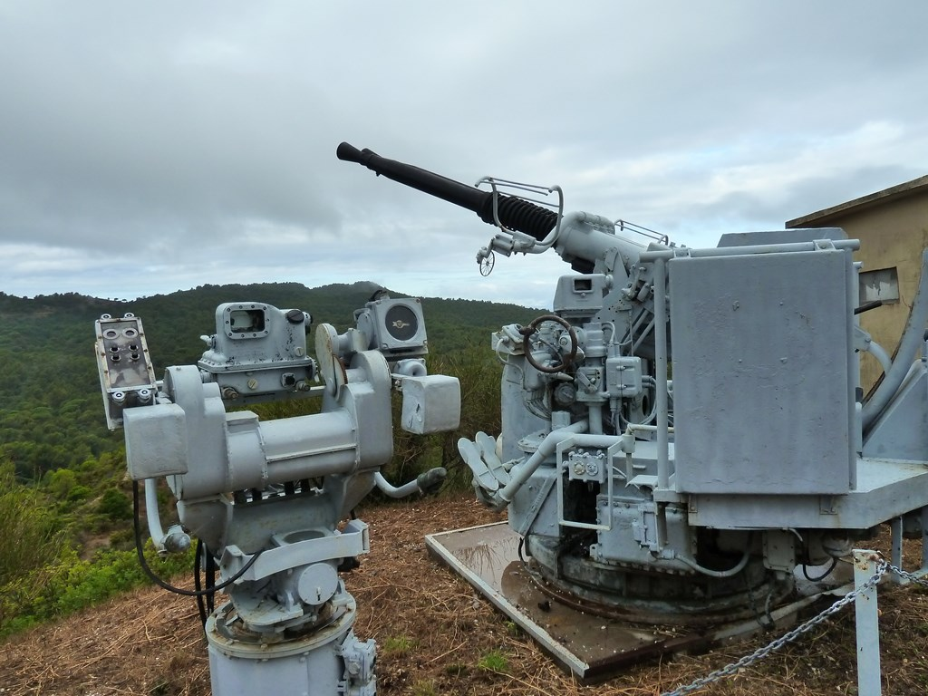 Pièce d'artillerie de la Batterie de Peyras, commune de La Seyne-sur-Mer (France) .